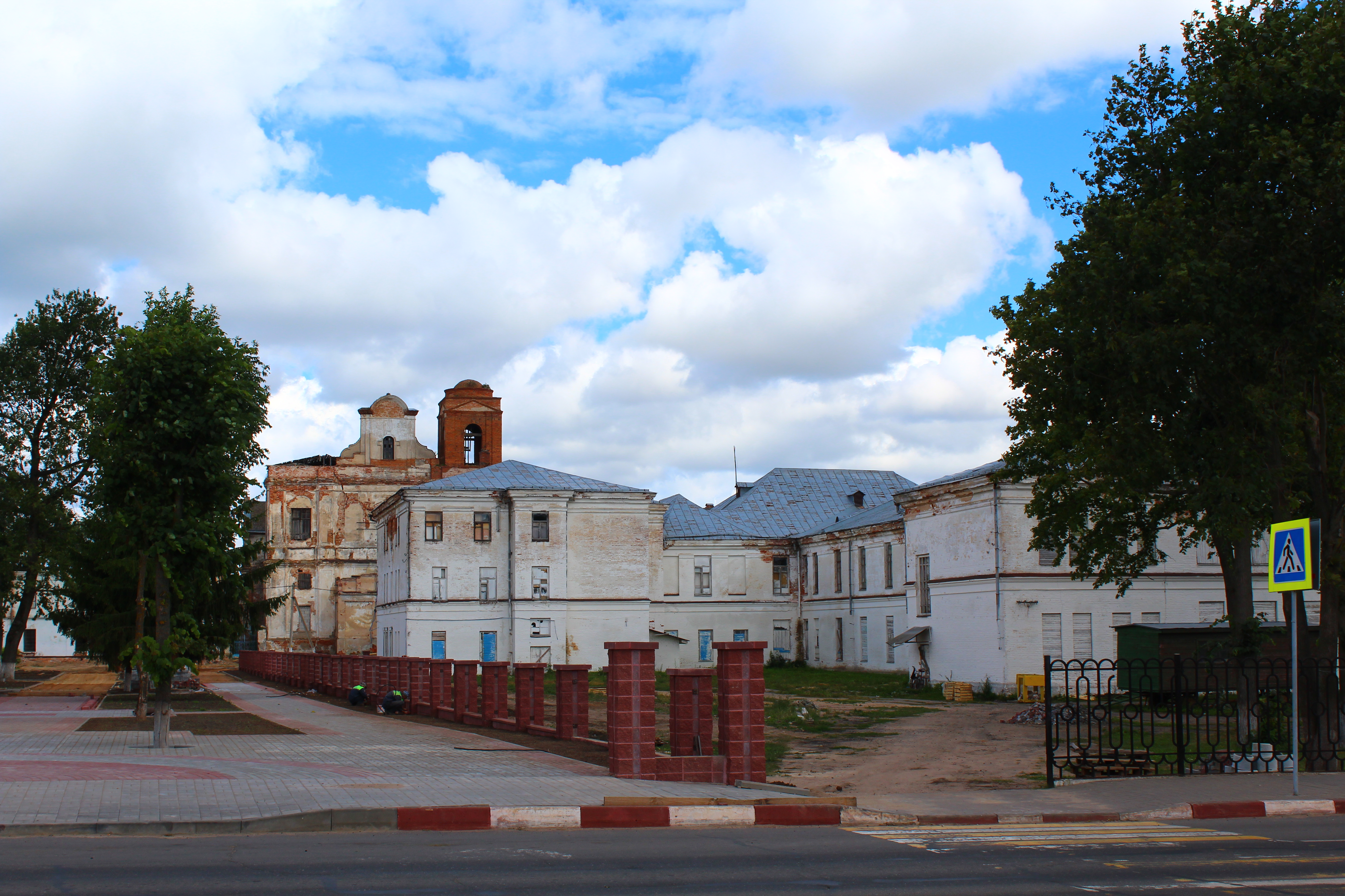 Мсціслаў. Краявіды